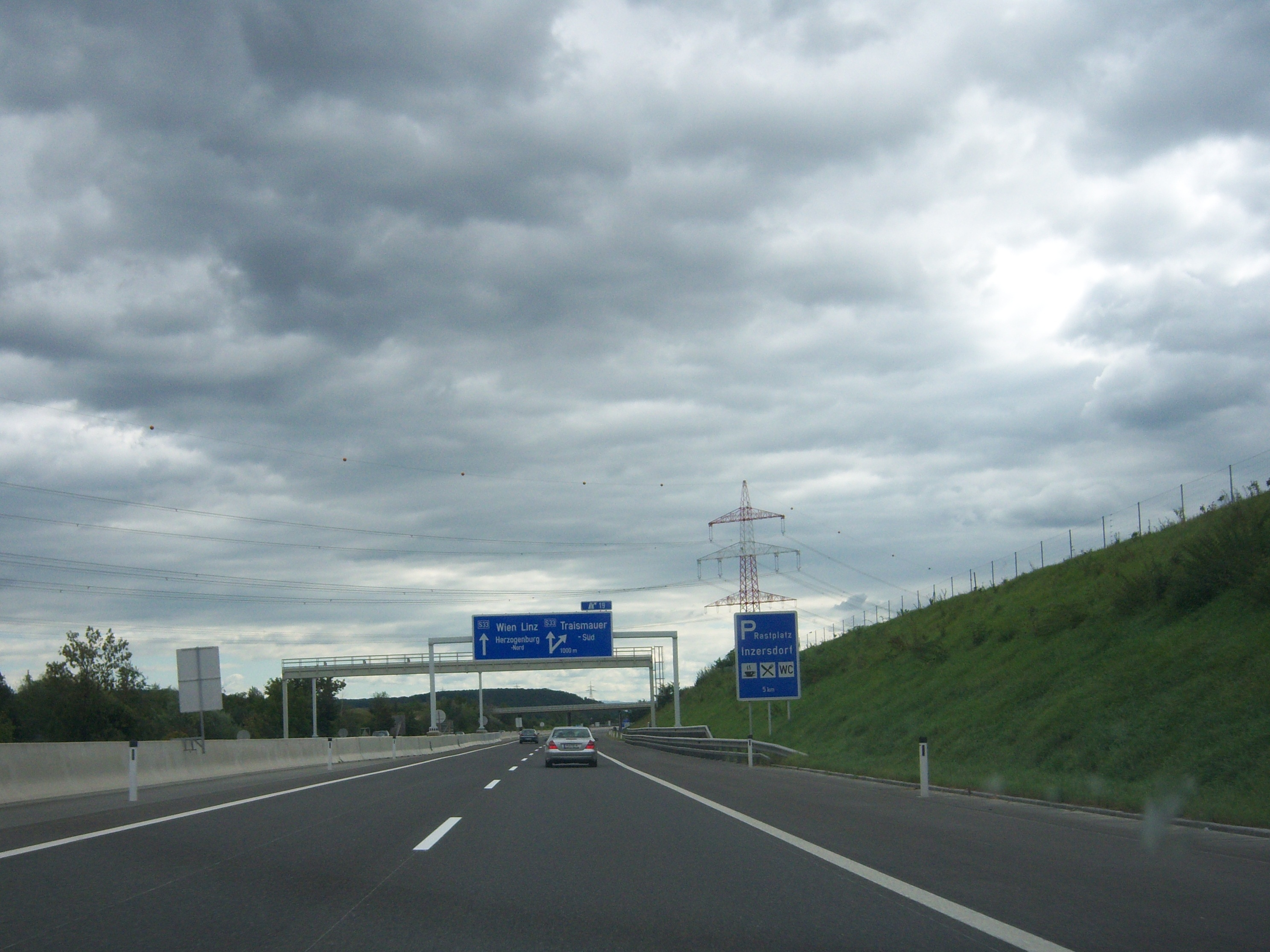 Kremser Schnellstraße S33 an der Anschlussstelle Traismauer-Süd